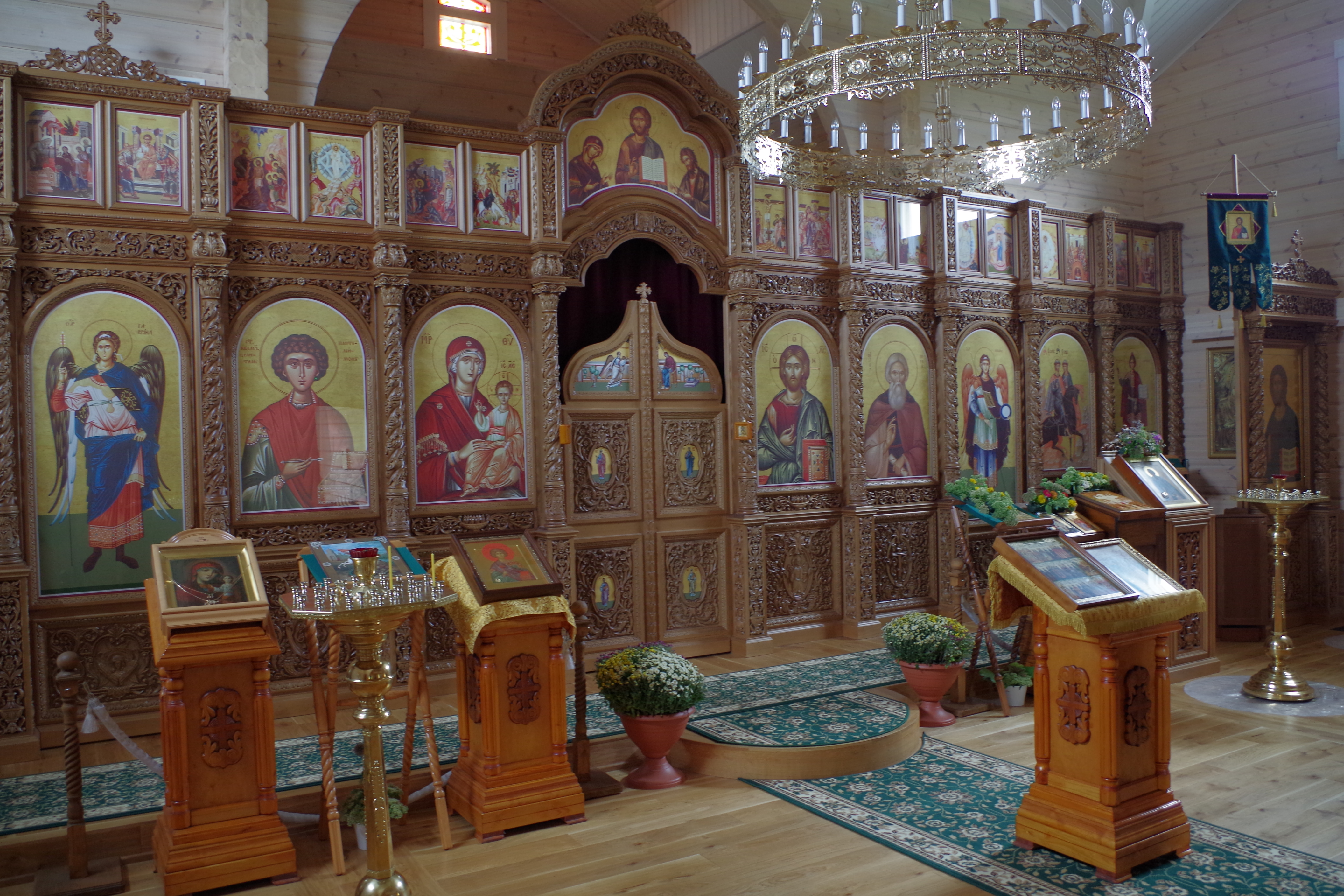 Paldiski Sergi kiriku ikonostaas